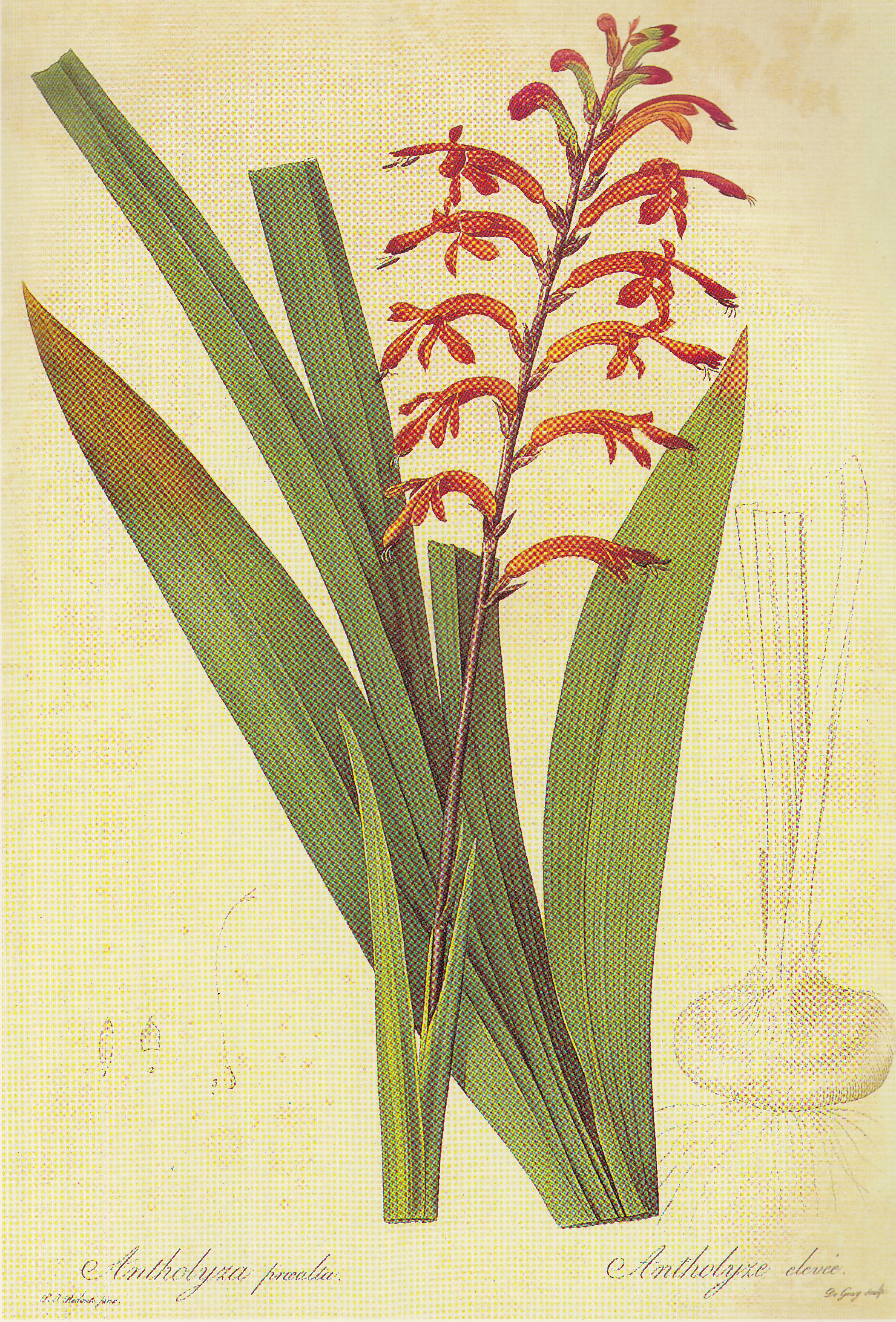 鸢尾百合。